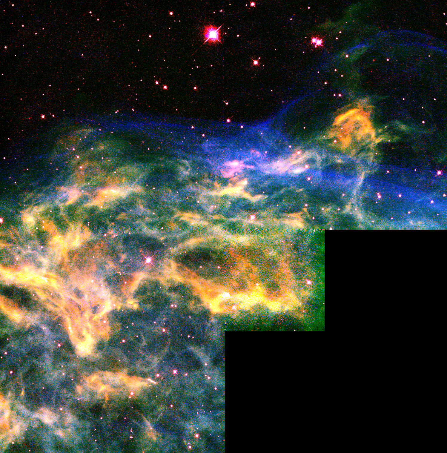 Crescent Nebula (NGC 6888).